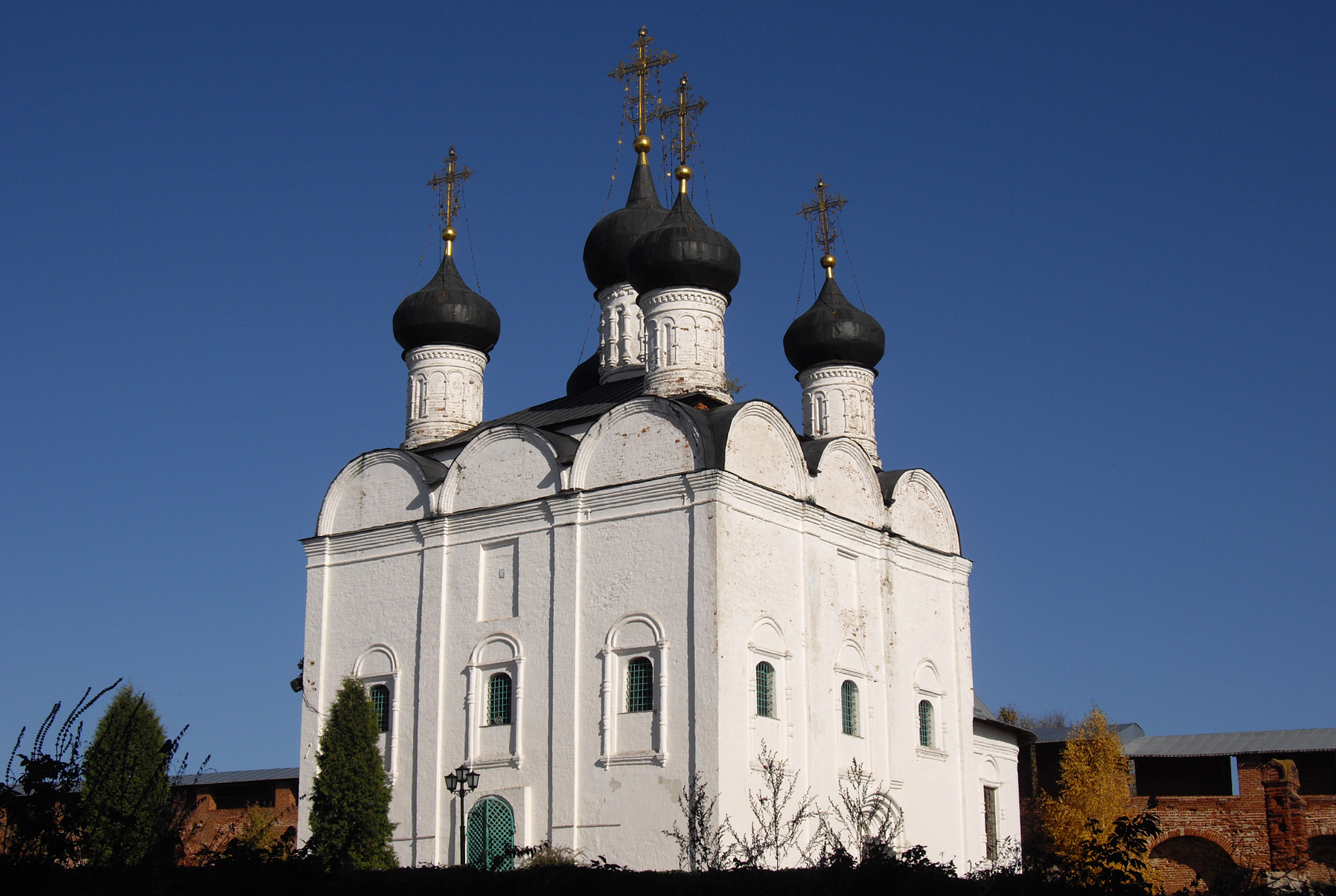 Зарайский кремль. Собор свт. Николая Чудотворца